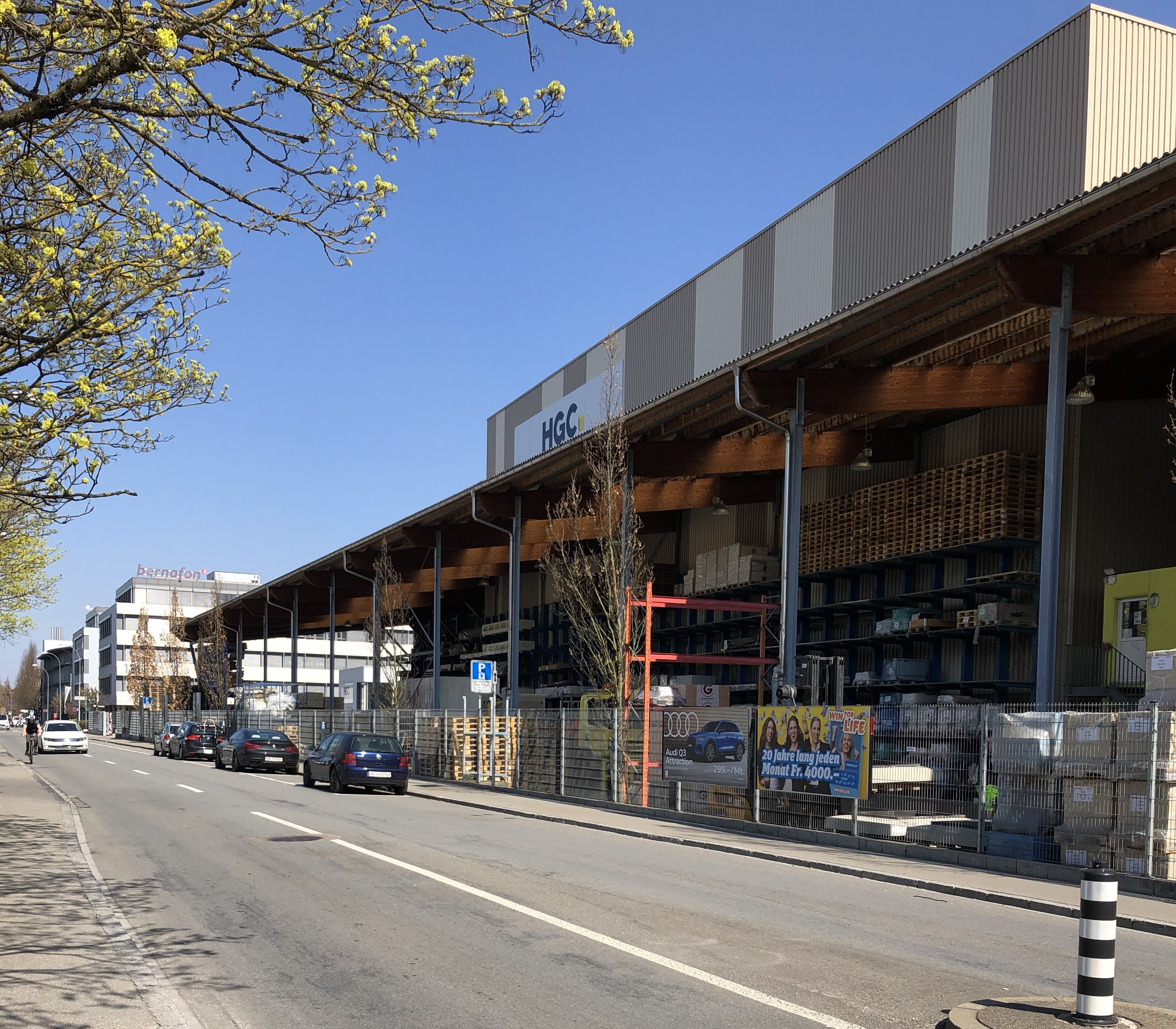 Kleefeld Industrie an der Morgenstrasse